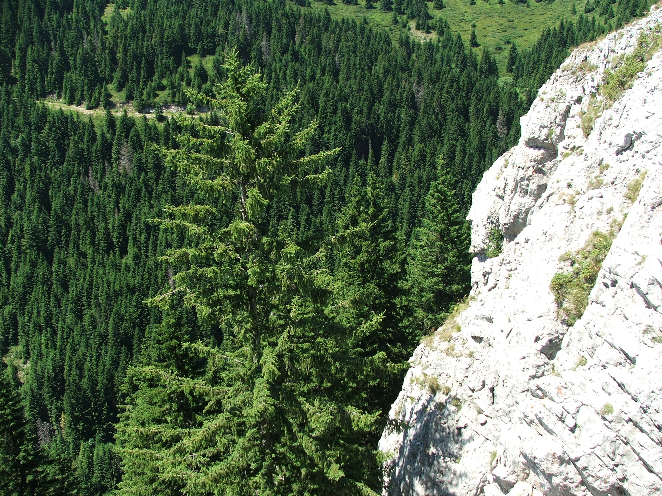 Ово је фотографија заштићеног природног добра у Србији под шифром: НП02This is a a photo of a natural area in Serbia with ID: НП02 Nacionalni park Kopaonik (NP02) - lokalitet Bele Stene Српски (ћирилица): Национални Парк Копаоник (НП02) - локалитет Беле Стене